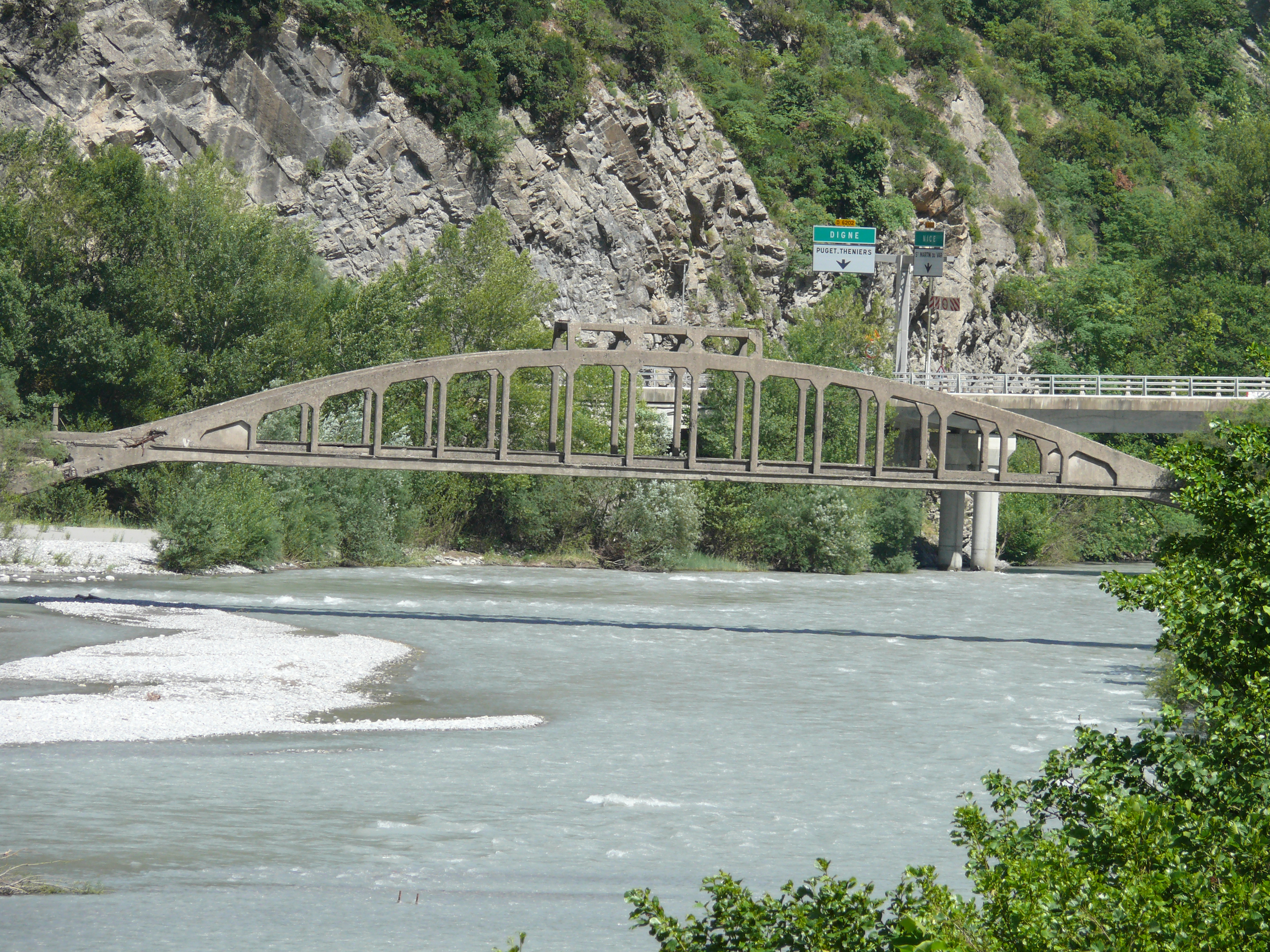 Le Var à la confluence avec la Tinée - L'ancien pont du tramway de la Tinée